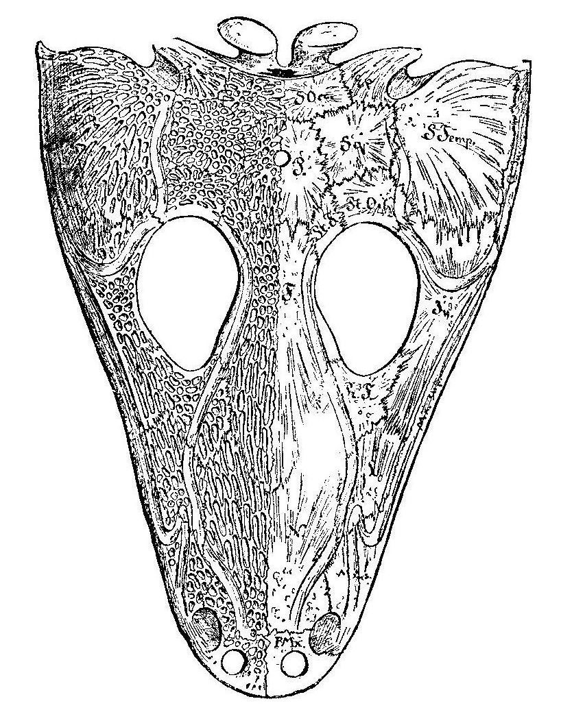 Череп мастодонзавра - Skull of Mastodonsaurus